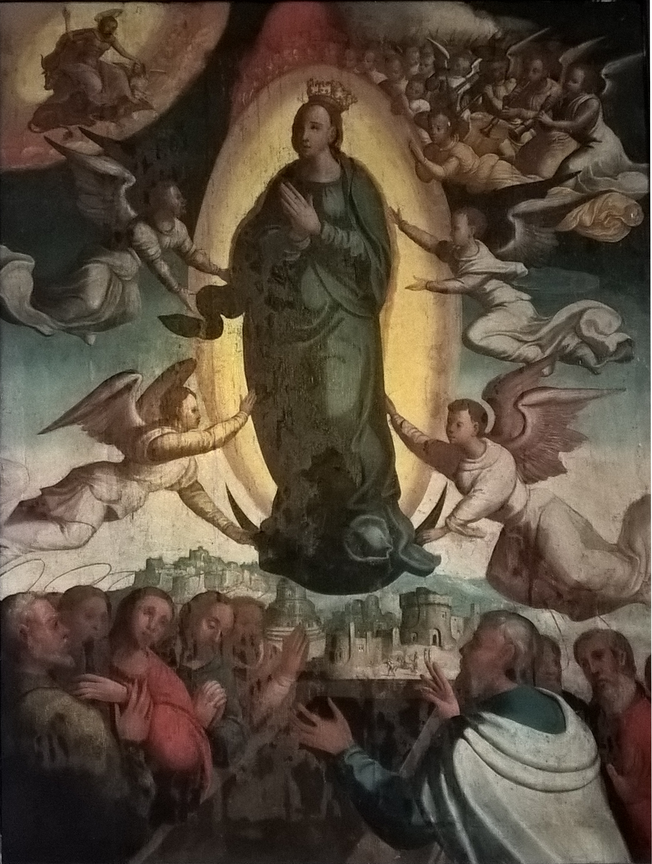 Pintura a óleo sobre tela "Encontro de Santa Ana e São Joaquim" do Mestre de Arruda dos Vinhos, integrante do Políptico quinhentista da Matriz de Arruda dos Vinhos, de cerca de 1550